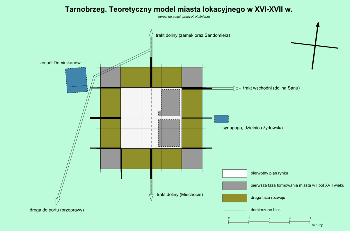 Tarnobrzeg's Town Model from XVI-XVII century